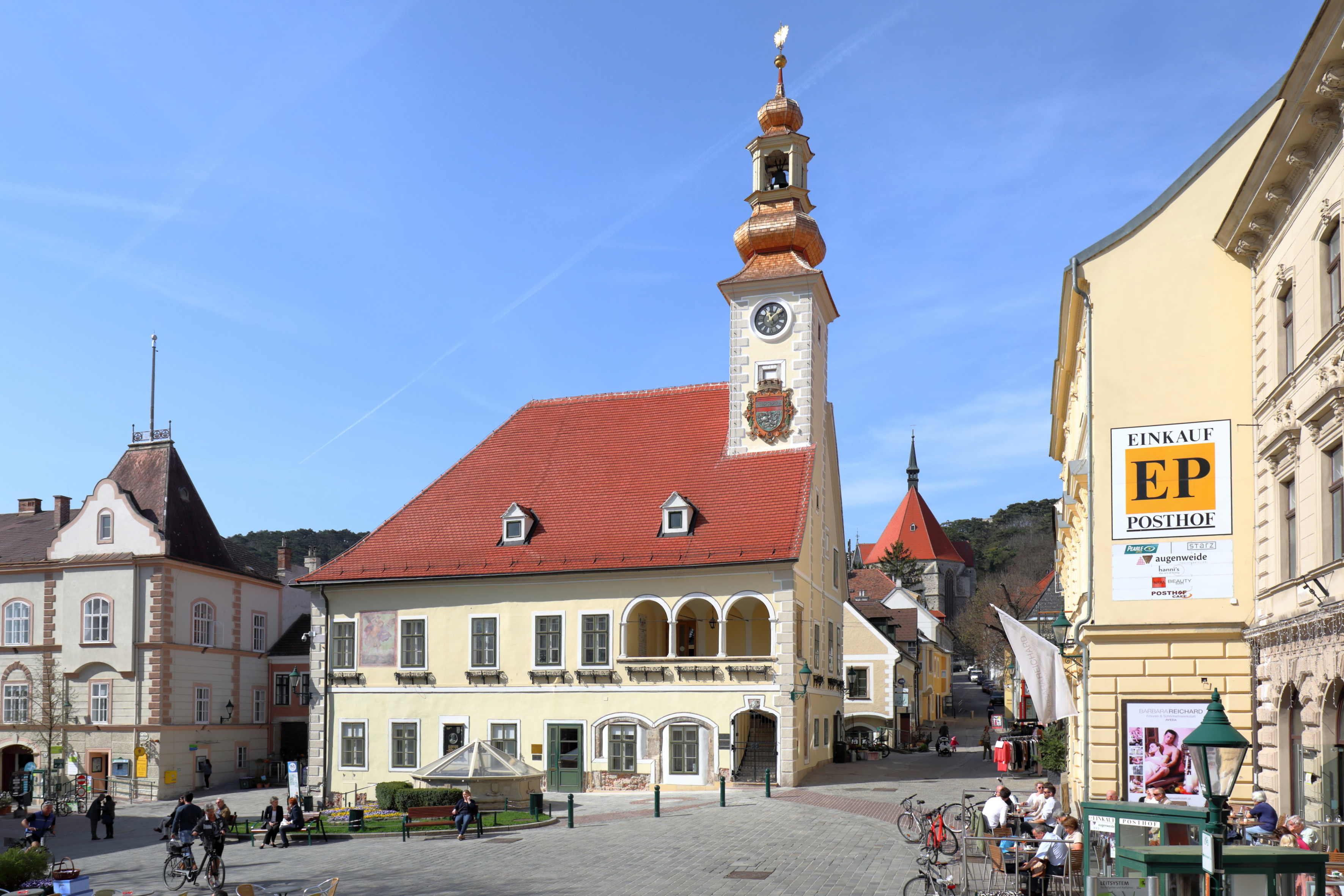 Das alte Rathaus am Schrannenplatz in der niederösterreichischen Bezirkshauptstadt Mödling und rechts im Hintergrund die St.-Othmar-Kirche.Der freistehende, zweigeschossige und im Kern gotischer Bau mit Walmdach und Turmaufsatz ist mit 1548 datiert und wurde mehrfach umgebaut und verändert.